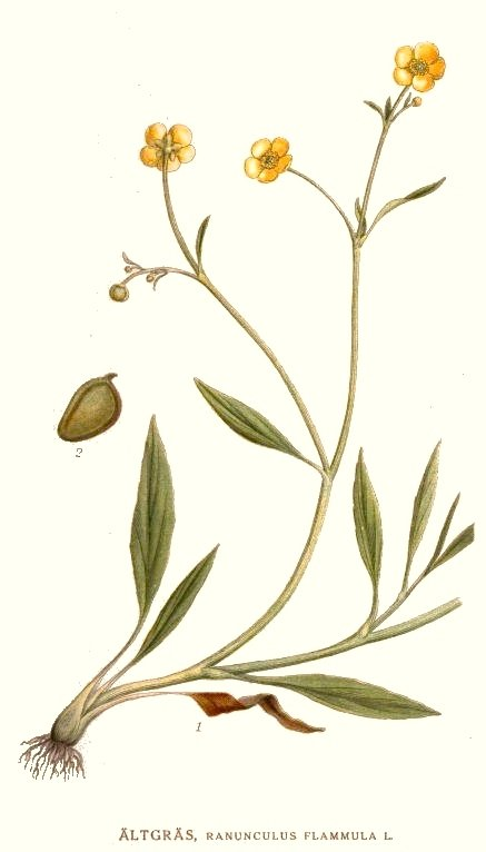 Original Description Ältgräs, Ranunculus flammula L.